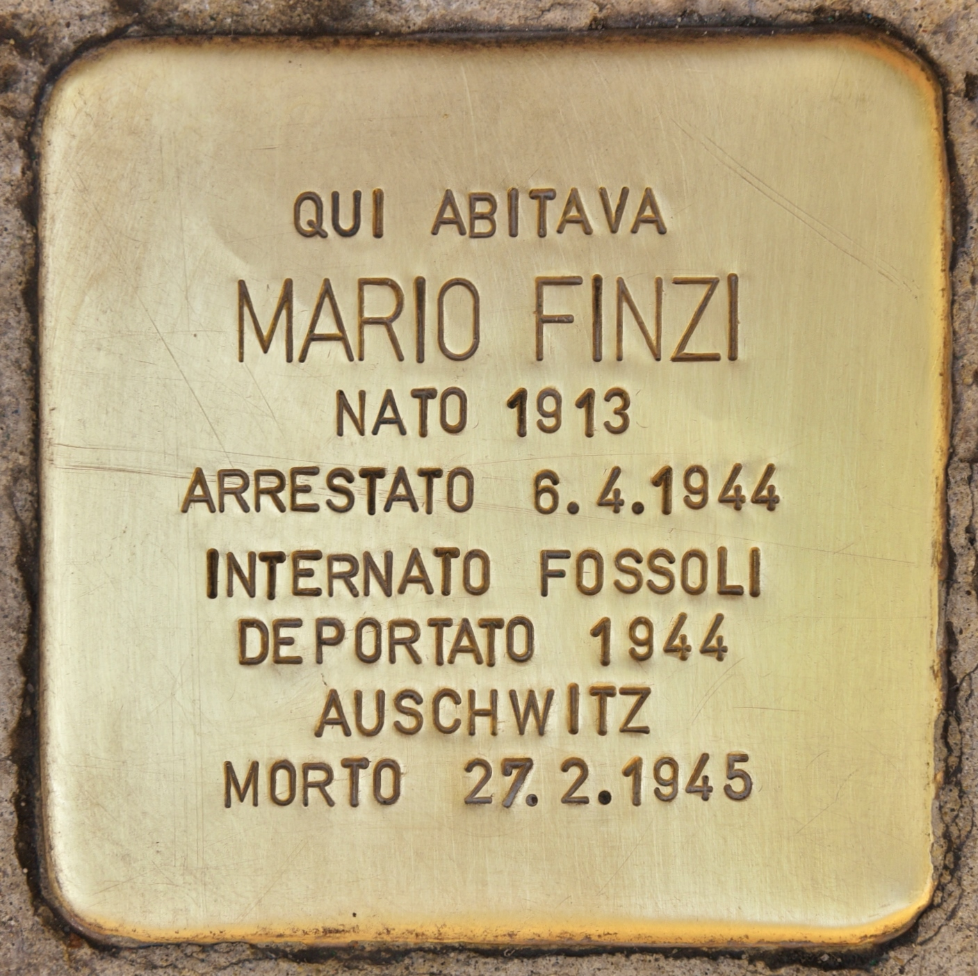 Stolperstein für Mario Finzi